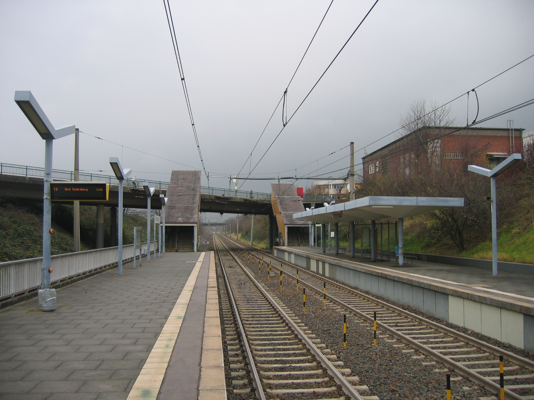 Haltestelle Buschdorf der Bonner Stadtbahn